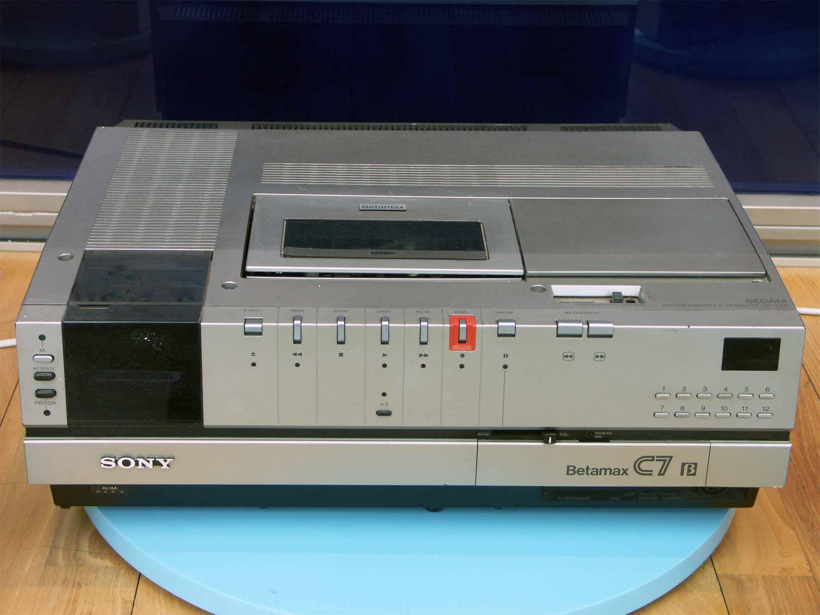 Sony Betamax C7 Videorecorder, für die Französische SECAM-Farbfernsehnorm